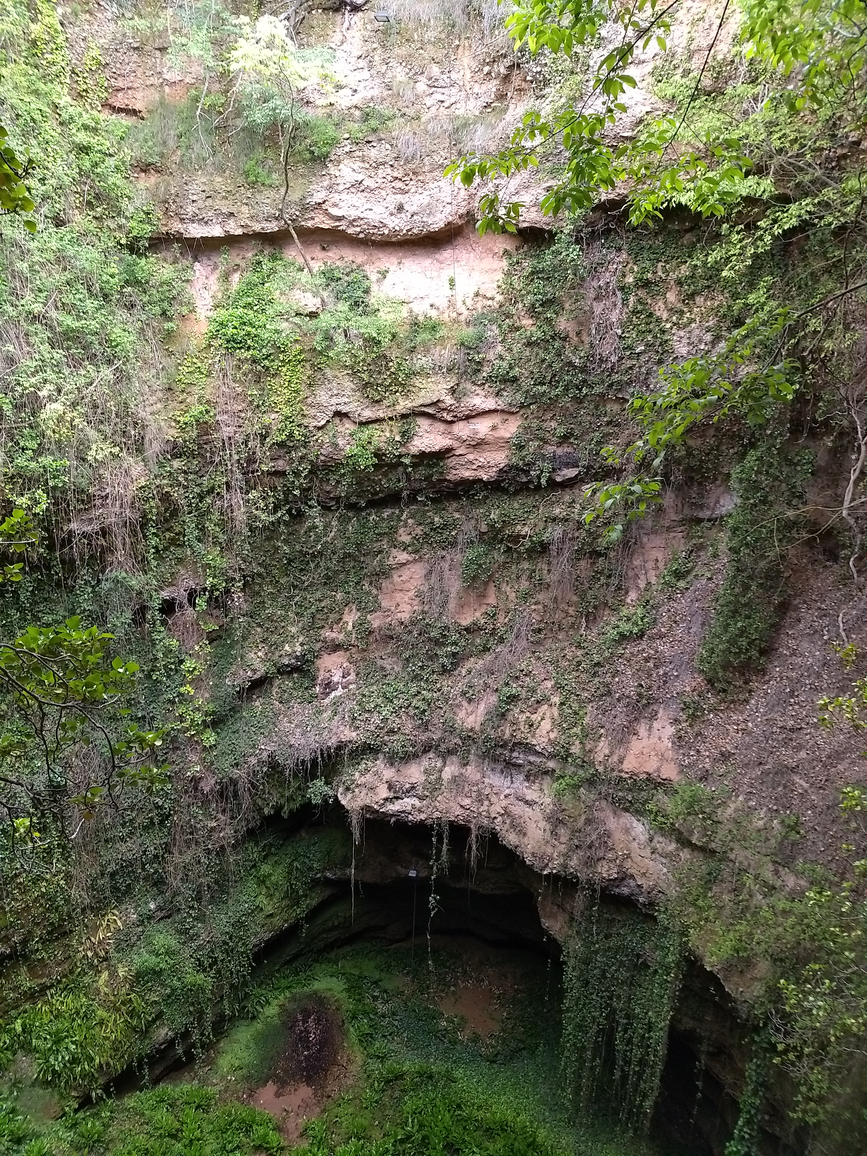 Aragonés: Pozo d'os Aines en Grisel